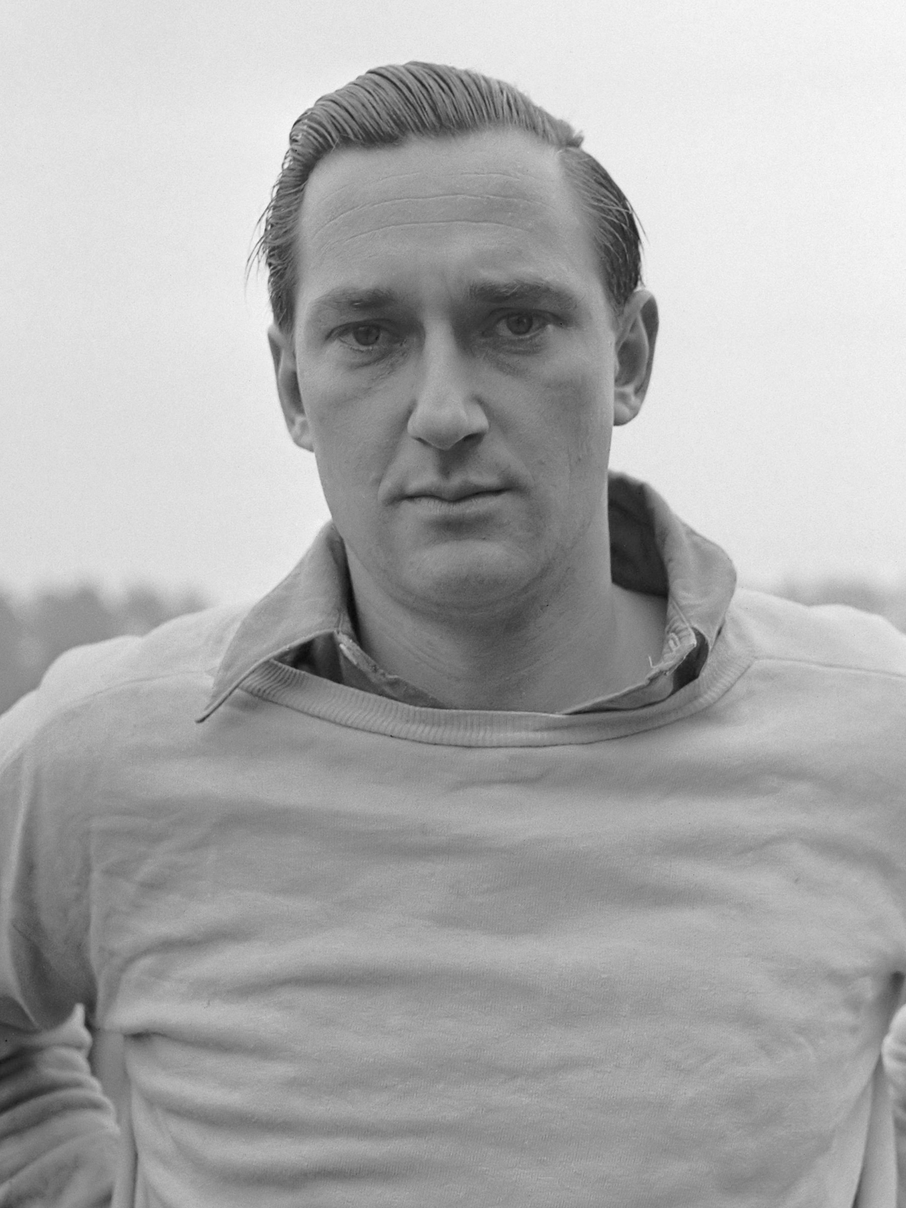 Koppen Nederlands hockey-elftal . L. S. Mulder 14 oktober 1956